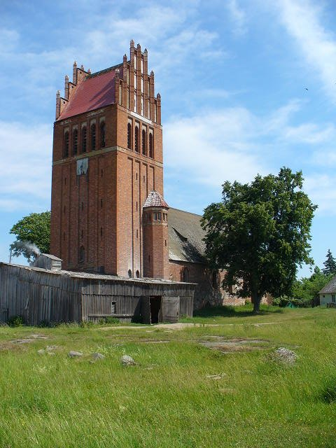 Kirche mit Turm in Allenburg